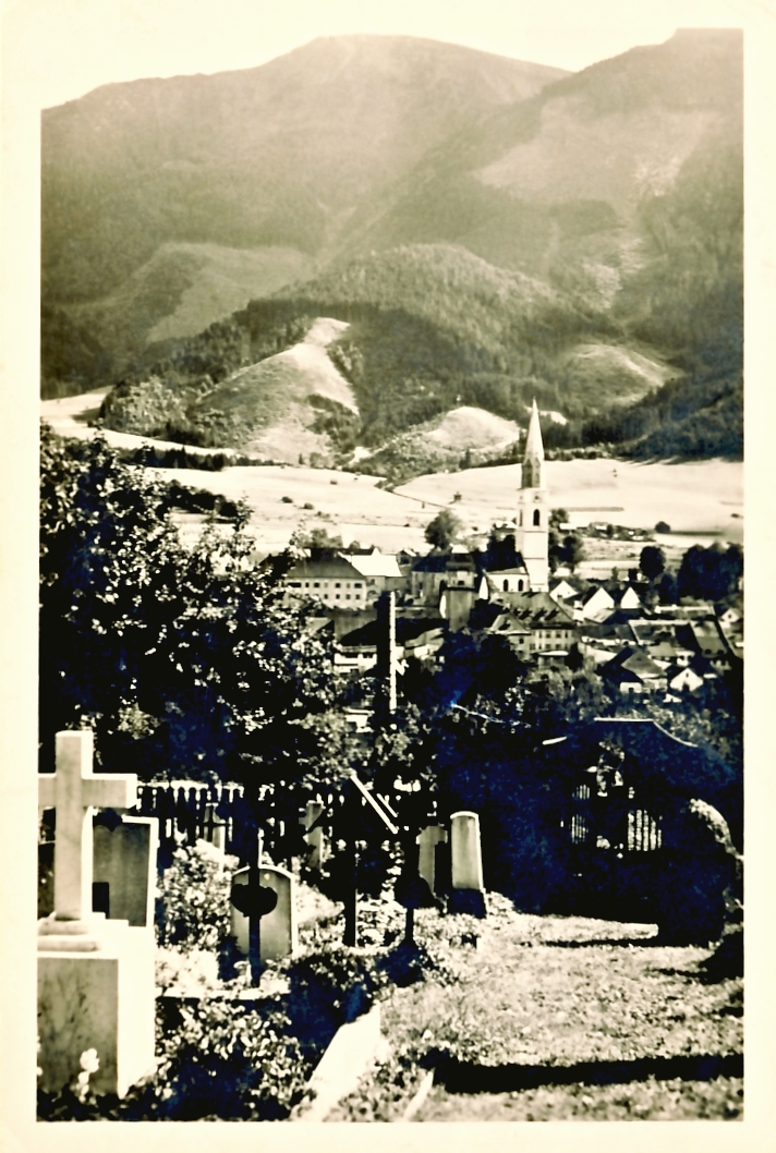 Ansicht Rottenmann